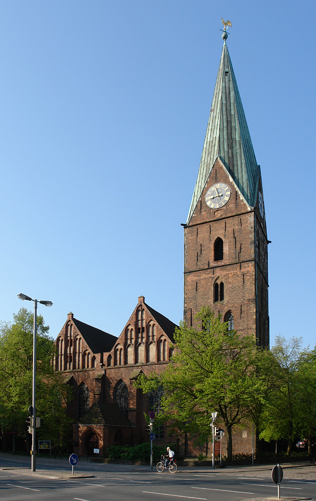 St.Martini-Kirche in Bremen. Blick von der Martini-Straße auf die Nordseite Das abgebildete Objekt ist ein geschütztes Kulturdenkmal in der Freien Hansestadt Bremen, mit der Nr. 0875,T beim Landesamt für Denkmalpflege registriert.